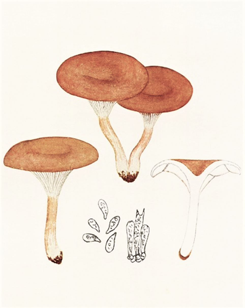 Giacomo Bresadola: Clitocybe flaccida (Sowerby, 1799) P.Kumm. (1871), heute Lepista flaccida (Sowerby), 1799) Pat. (1887)